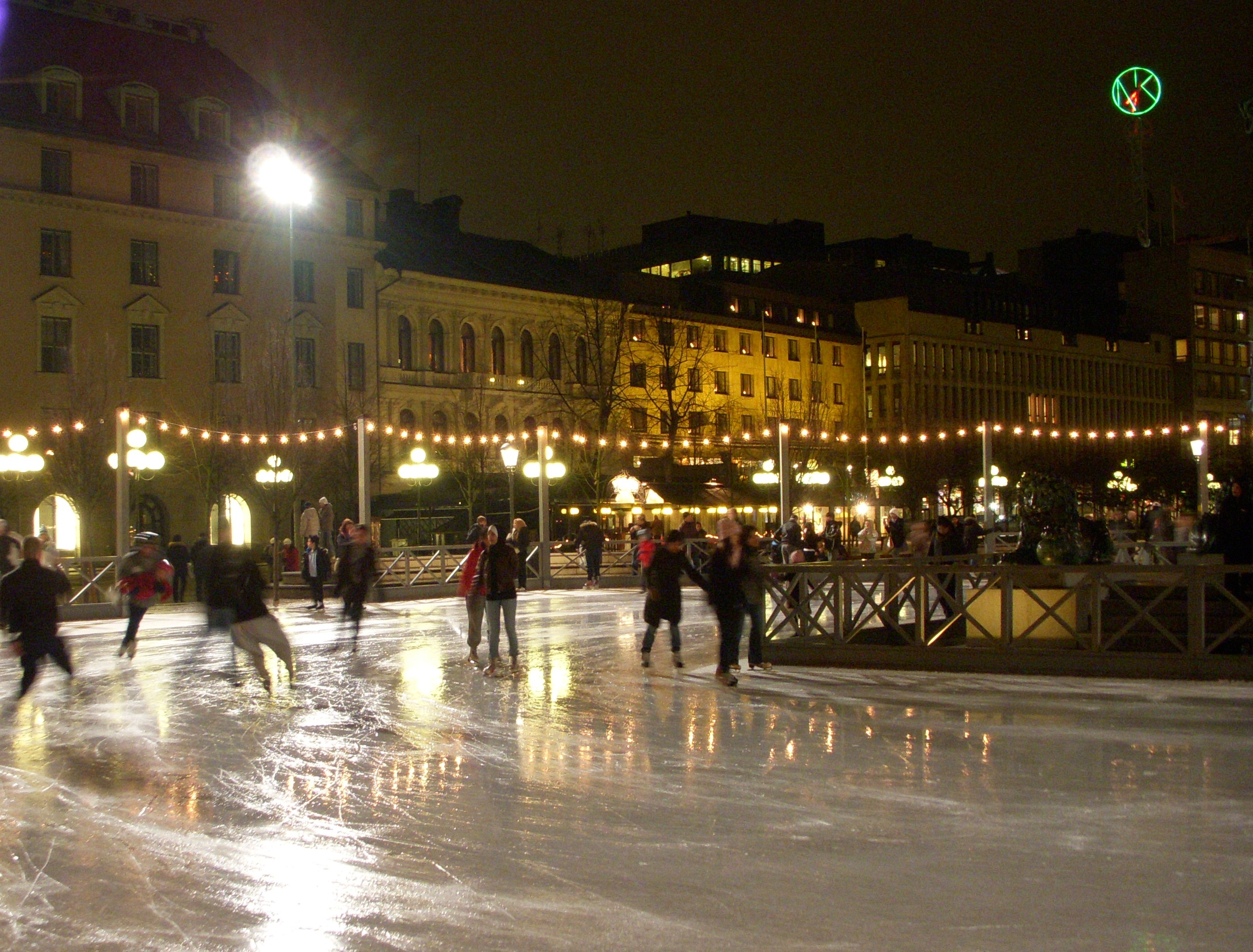 Skriskoåkning i Kungsträdgården, Stockholm